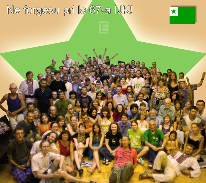 Grupa foto (arte aranĝita) de la partoprenintoj de la 67-a Internacia Junulara Kongreso: "Ne forgesu pri IJK 2011"